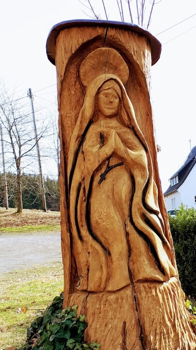 Seit Juli 2018 am Parkplatz der Klosteranlage Kohlhagen befindliche in einen Baumstamm geschnitzte Madonnenskulptur.